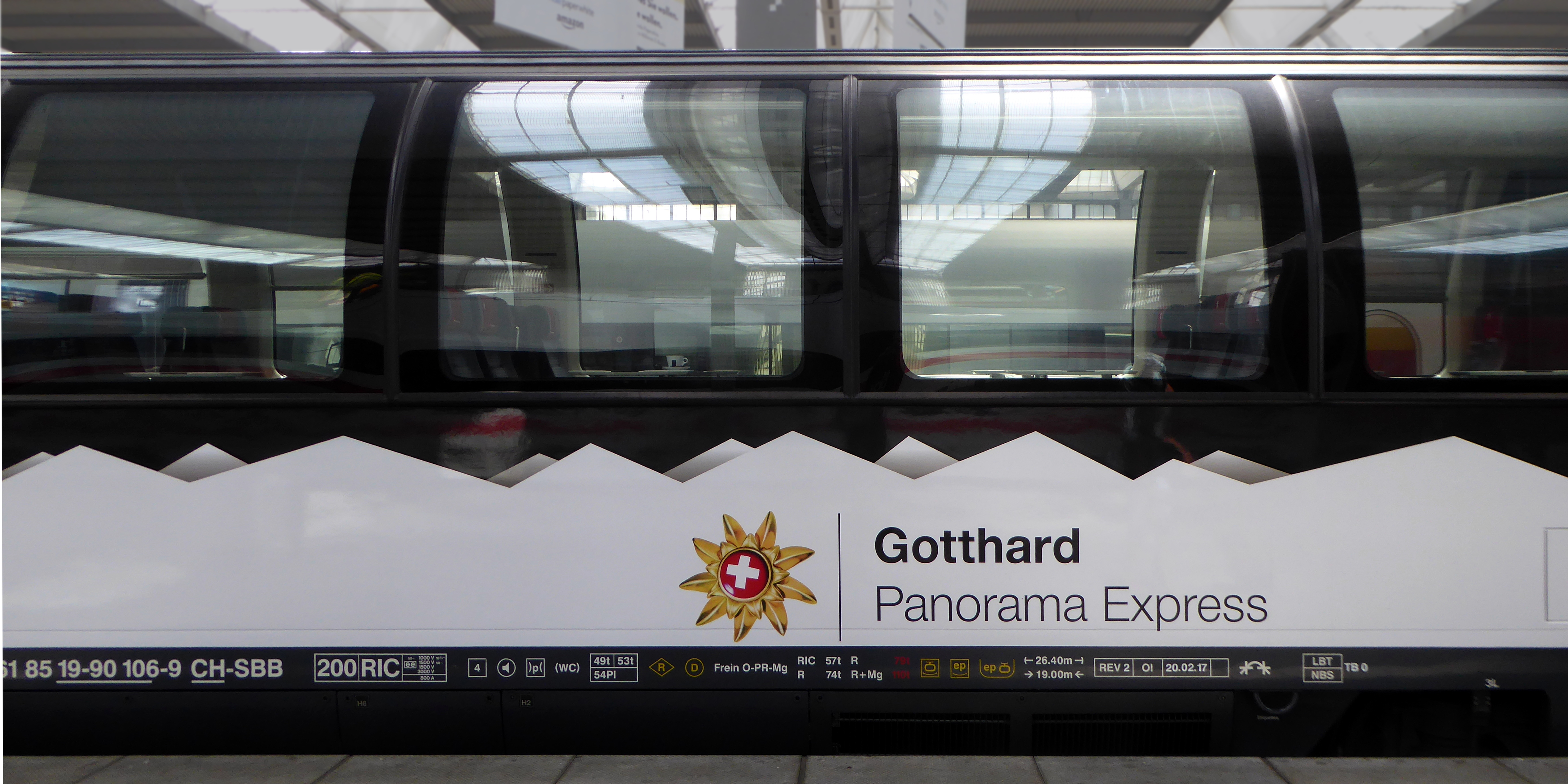 Aussichtswagen Apm_61_85_19-90_106-9 der SBB (Gotthard-Panorama-Express) in München Hbf.